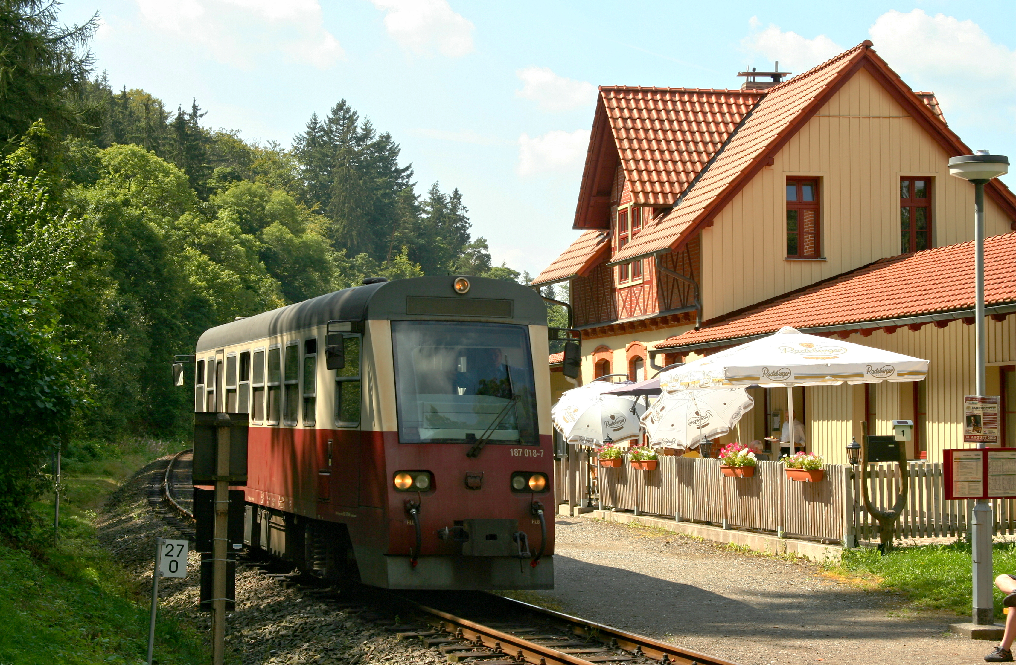 Haltepunkt Güntersberge der HSB mit Dieseltriebwagen 187 018 am 17. August 2012